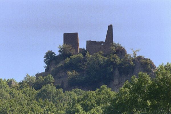 Ruine Reußenstein igelball 19:13, 6. Aug 2003 (CEST)